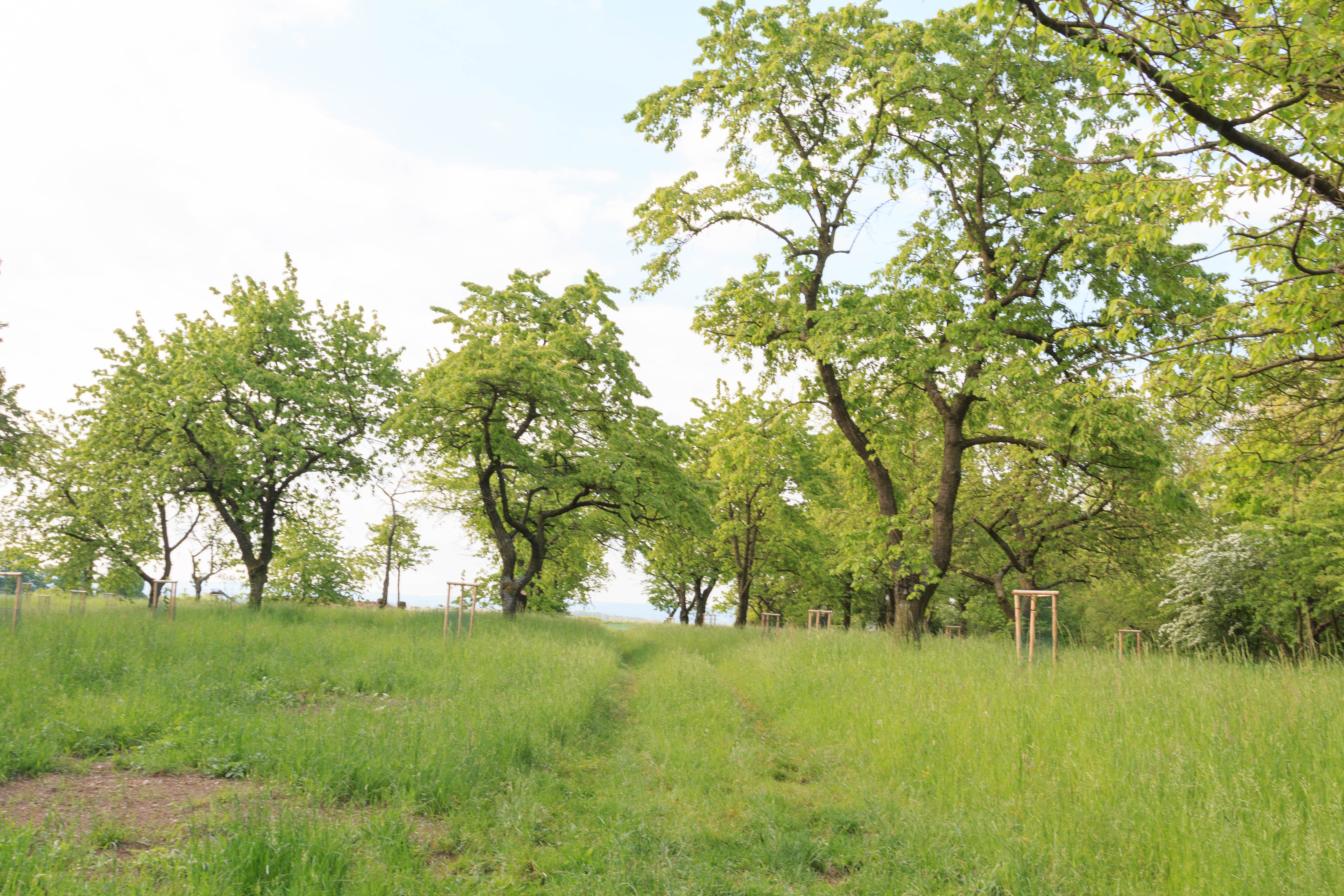 Hradiště, Na hradě, Topol (Chrudim). Project: Chráněná území